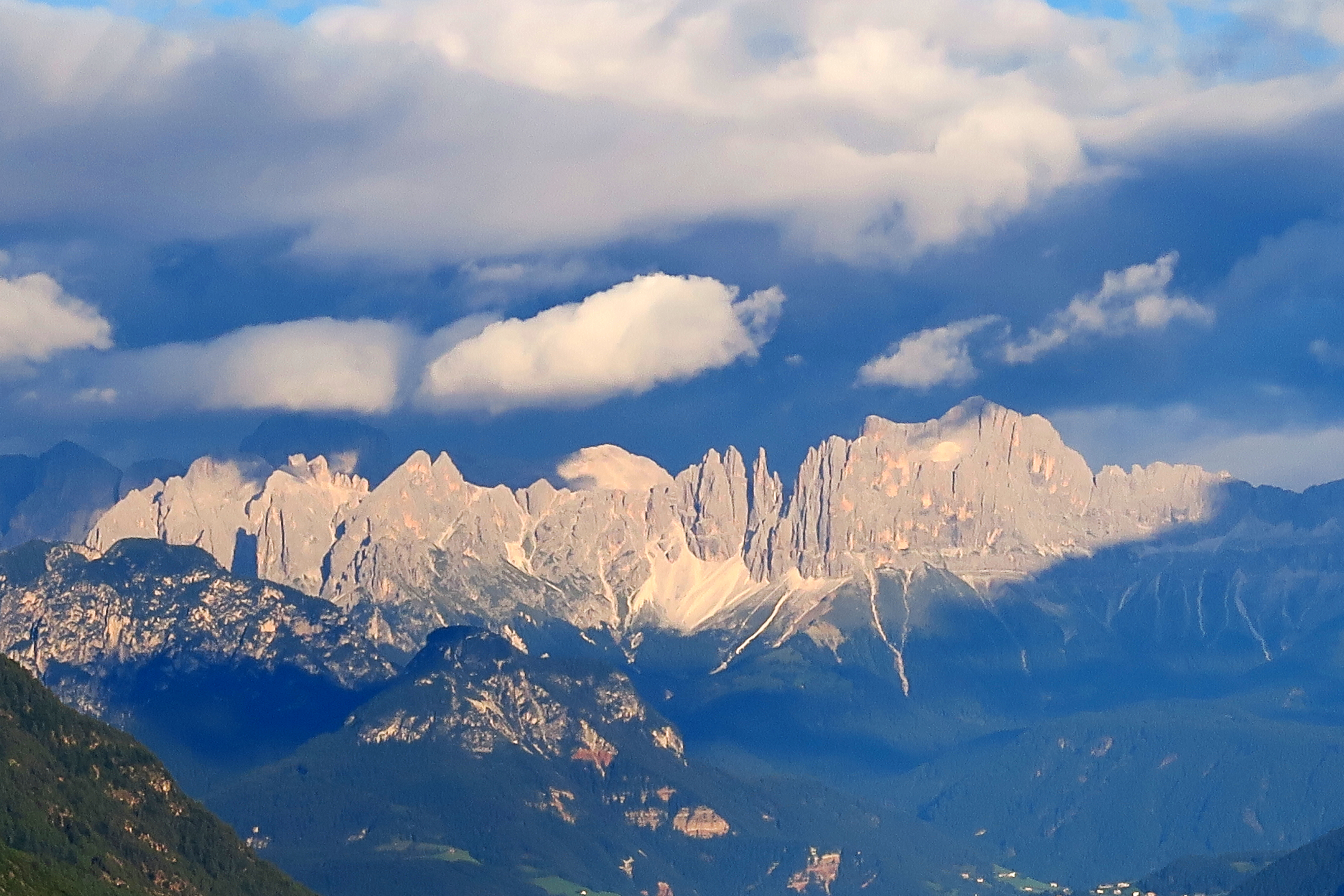 Italien, Südtirol, Bozen, Nals Ortsteil Sirmian, die Rosengartengruppe vom Restaurant "Appolonia" aus gesehen